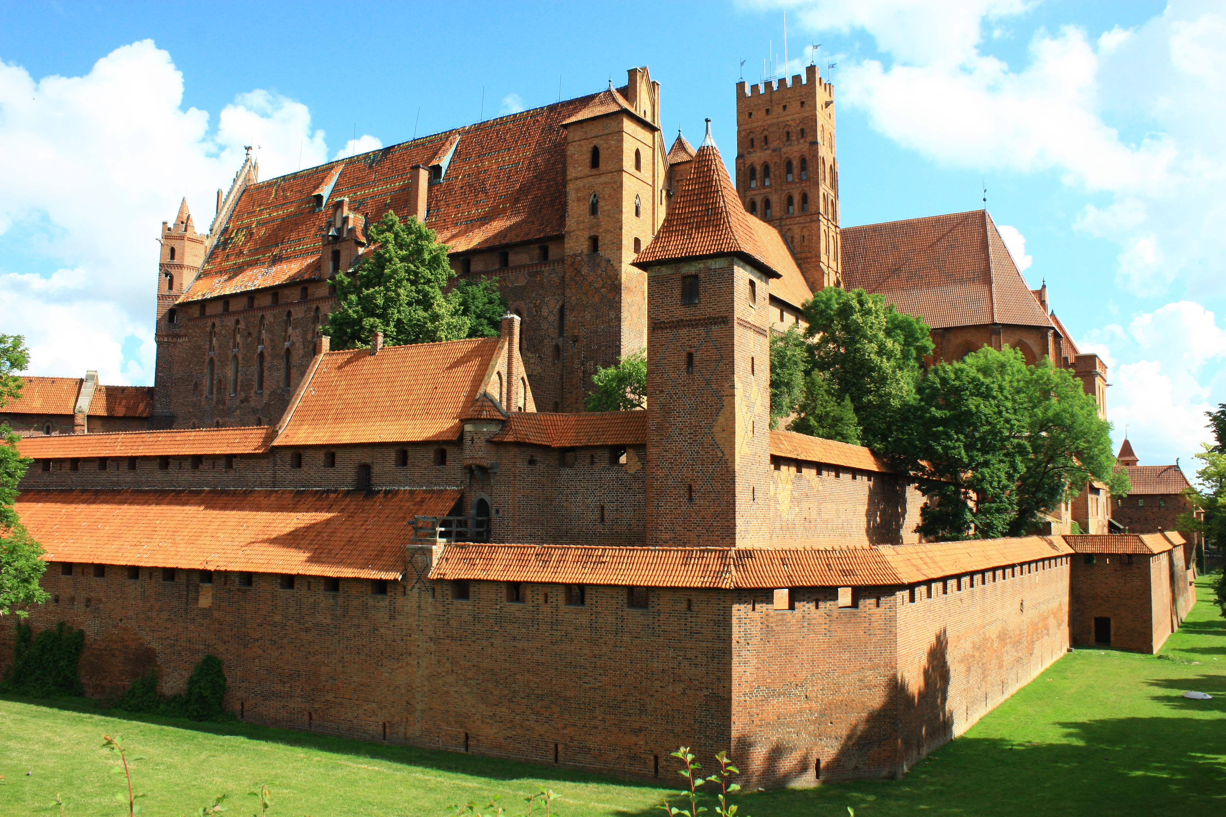 Malbork, zespół zamku krzyżackiego, XIII, XIX